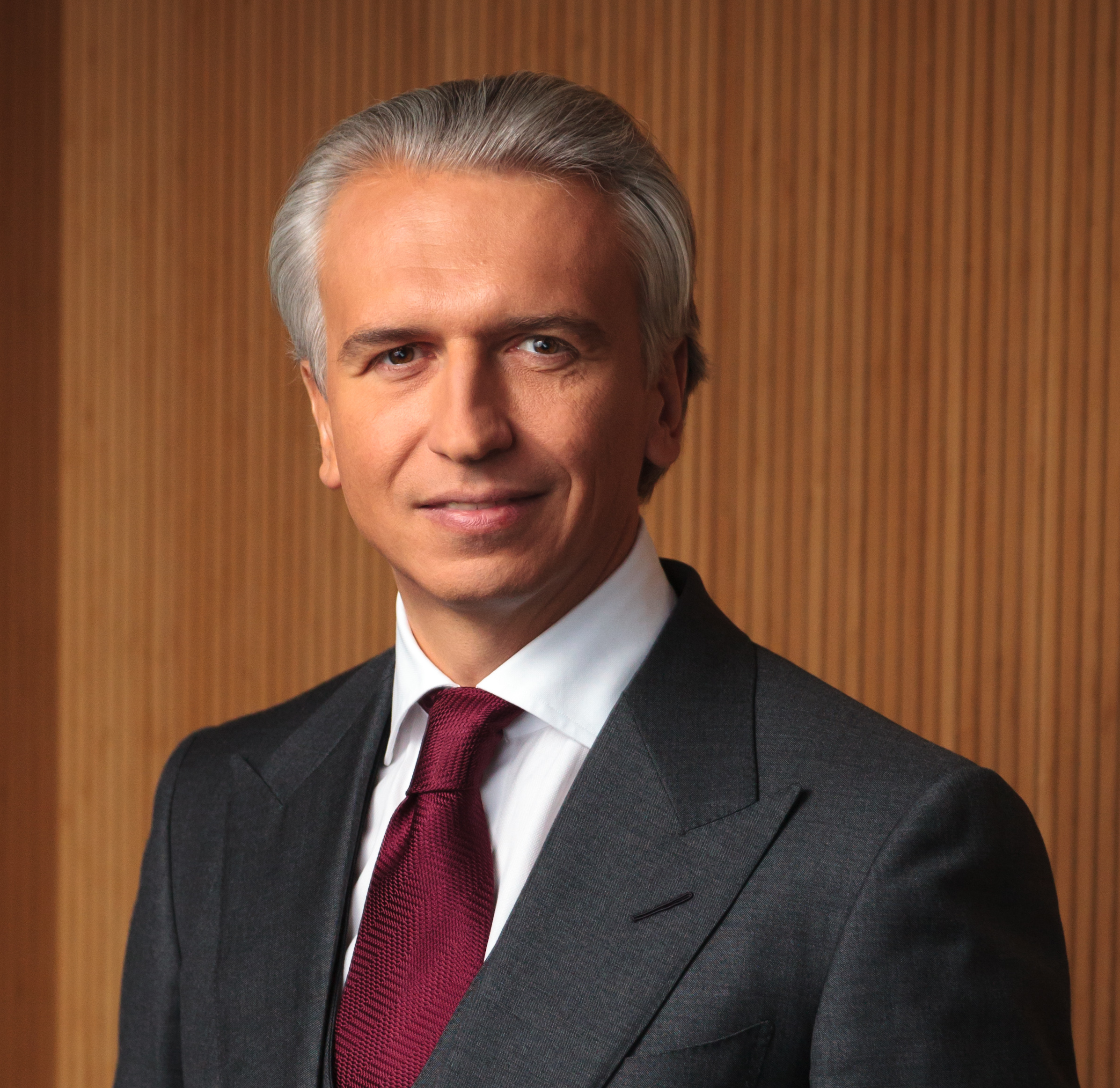 Алекса́ндр Вале́рьевич Дю́ков